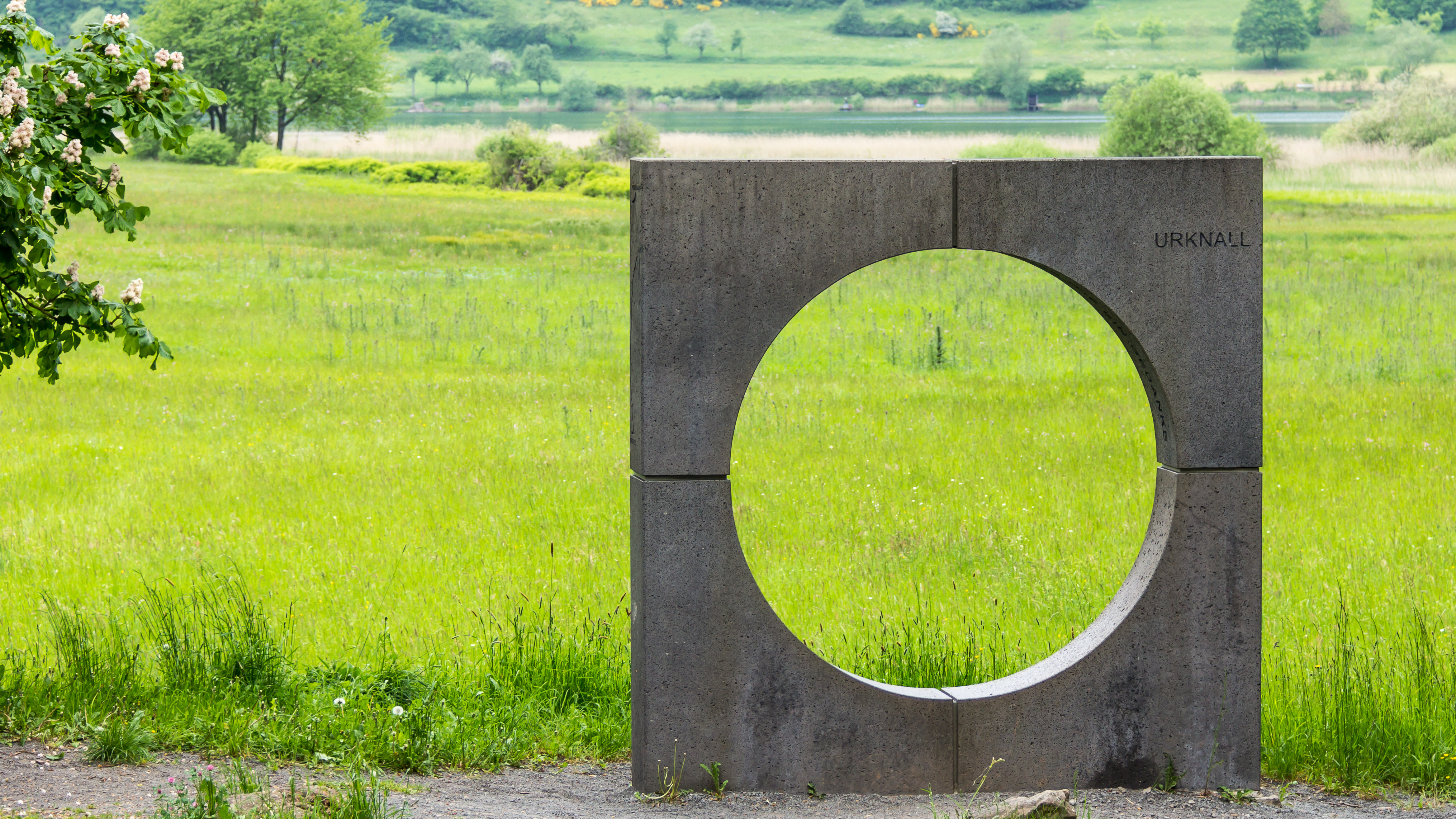 Meerfelder Maar. Naturschutzgebiet (Kennung: 7231-054) Foto: Skulptur „Urknall“. Hier endet der Kosmosradweg (ein Radwanderweg, der von Daun kommt)